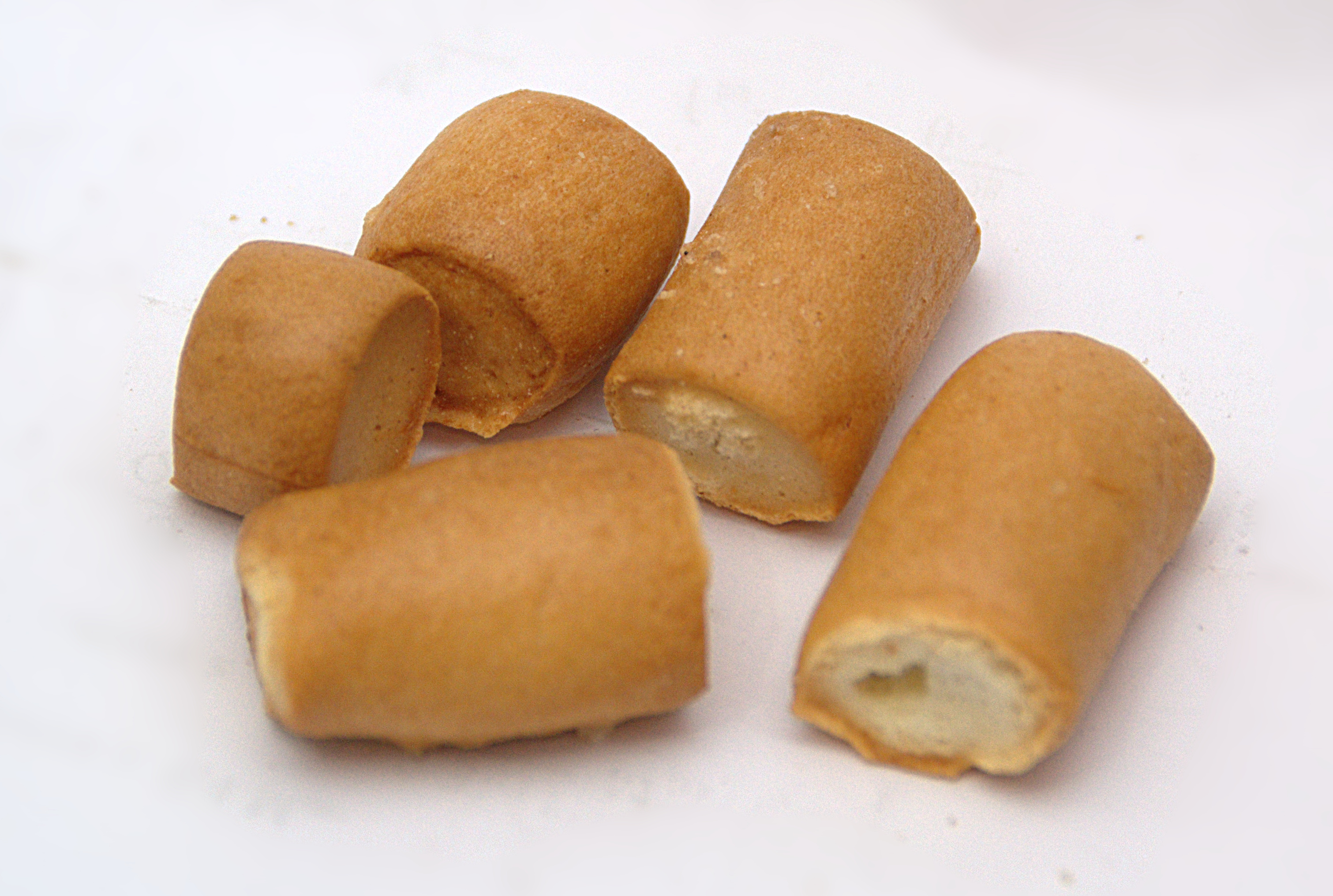 Le kaki, une variante de pain, vendu en Tunisie